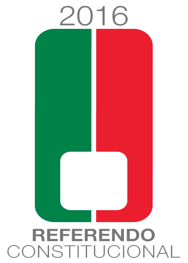 Logotipo del referendo constitucional de Bolivia de 2016.